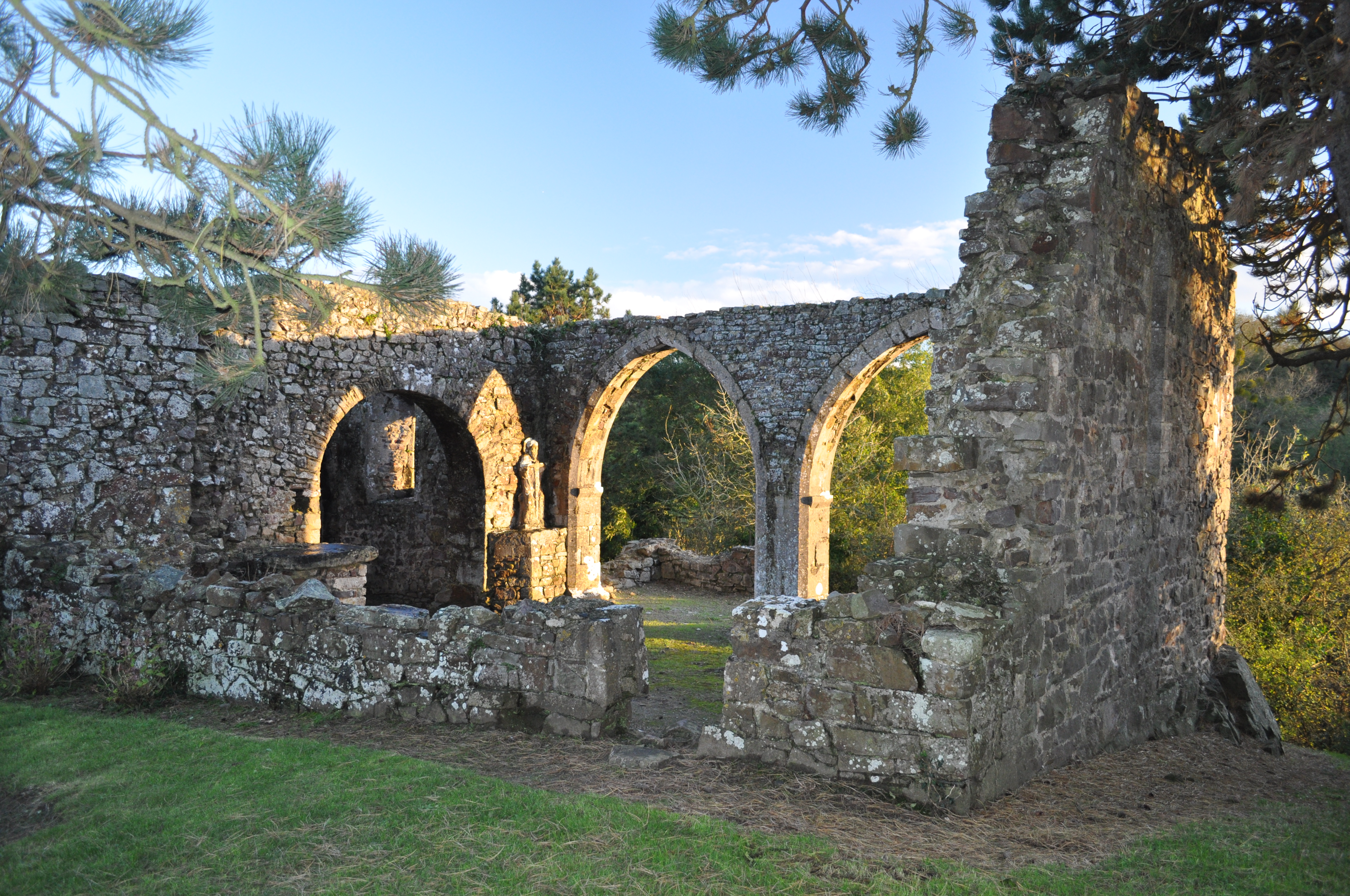 Chapelle Saint-Michel de Lestre